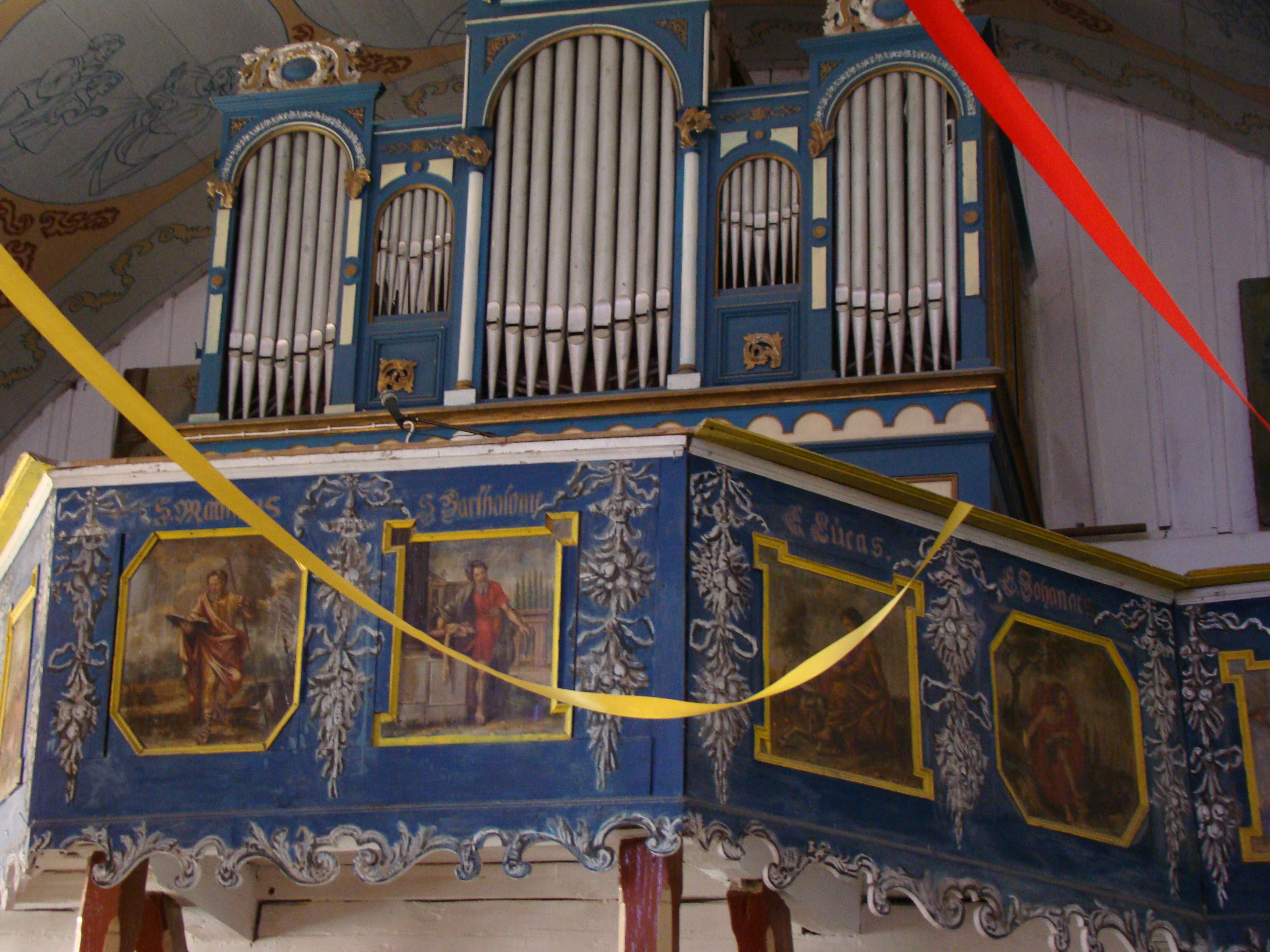 Pieszkowo - kościół pw. św. Marii Magdaleny z cmentarzem przykościelnym (zabytek nr A-72 z 15.04.1950 i (NID) 779 z 6.02 1968)